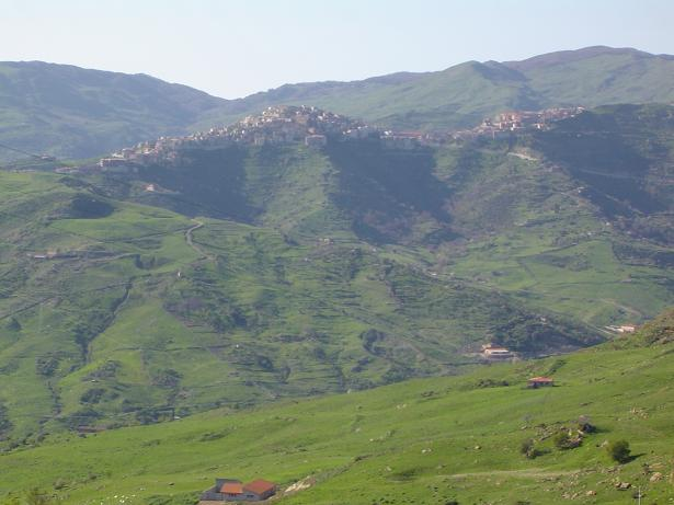 Panorama del paese di Capizzi in provincia di Messina.